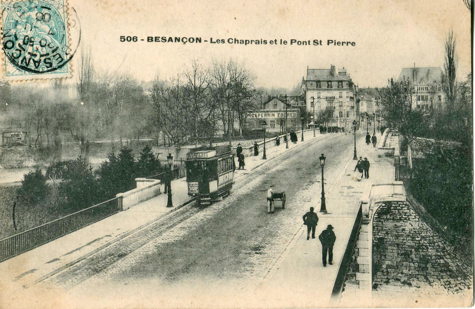 Carte postale ancienne sans mention d'éditeur, n°506 : Besançon - Les Chaprais et le Pont Saint-Pierre Vue d'une rame de l'ancien tramway de Besançon